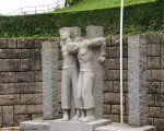 Mémorial